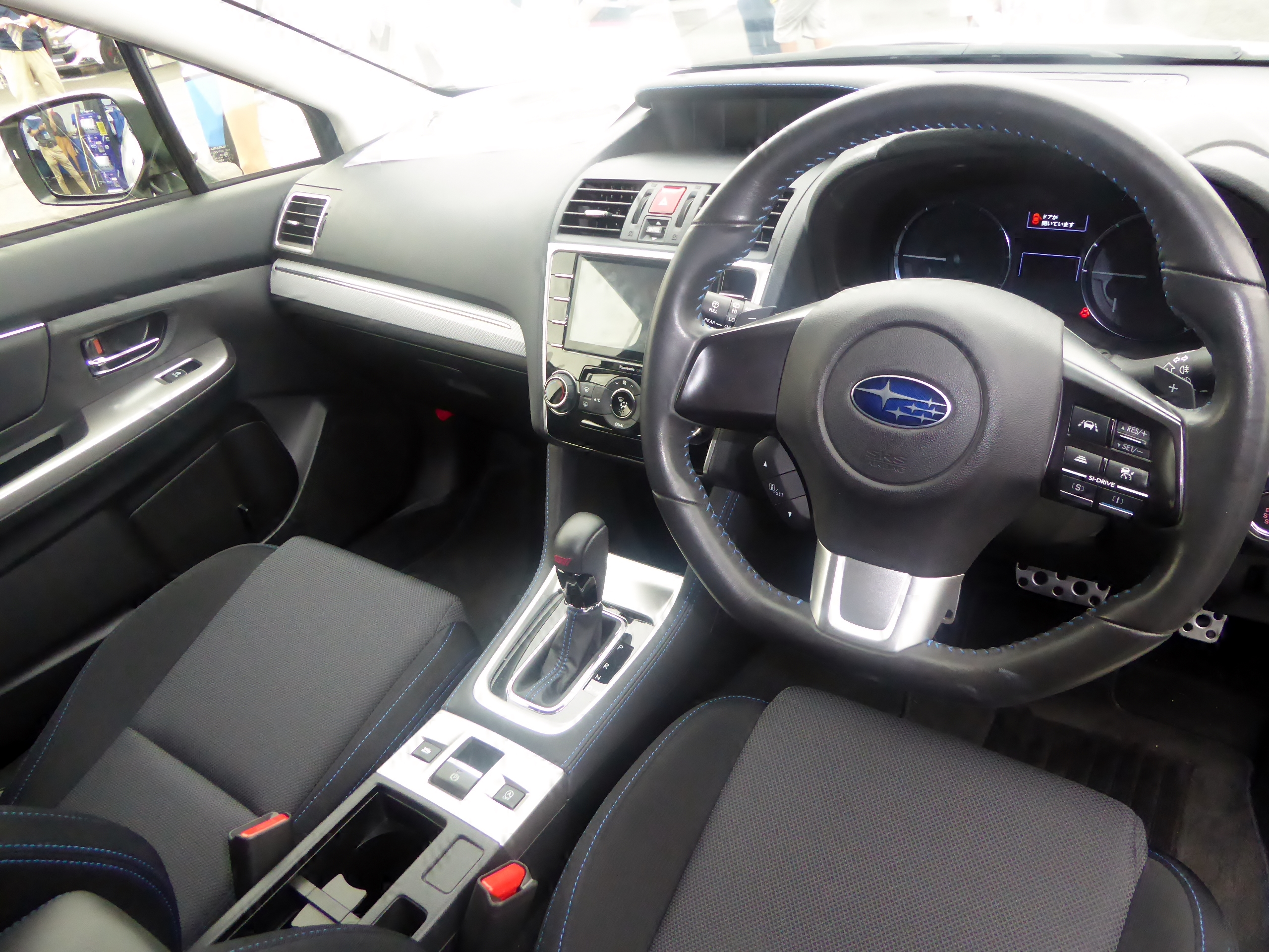 VMG型スバル・レヴォーグSTIパフォーマンスパッケージのインテリアを撮影。